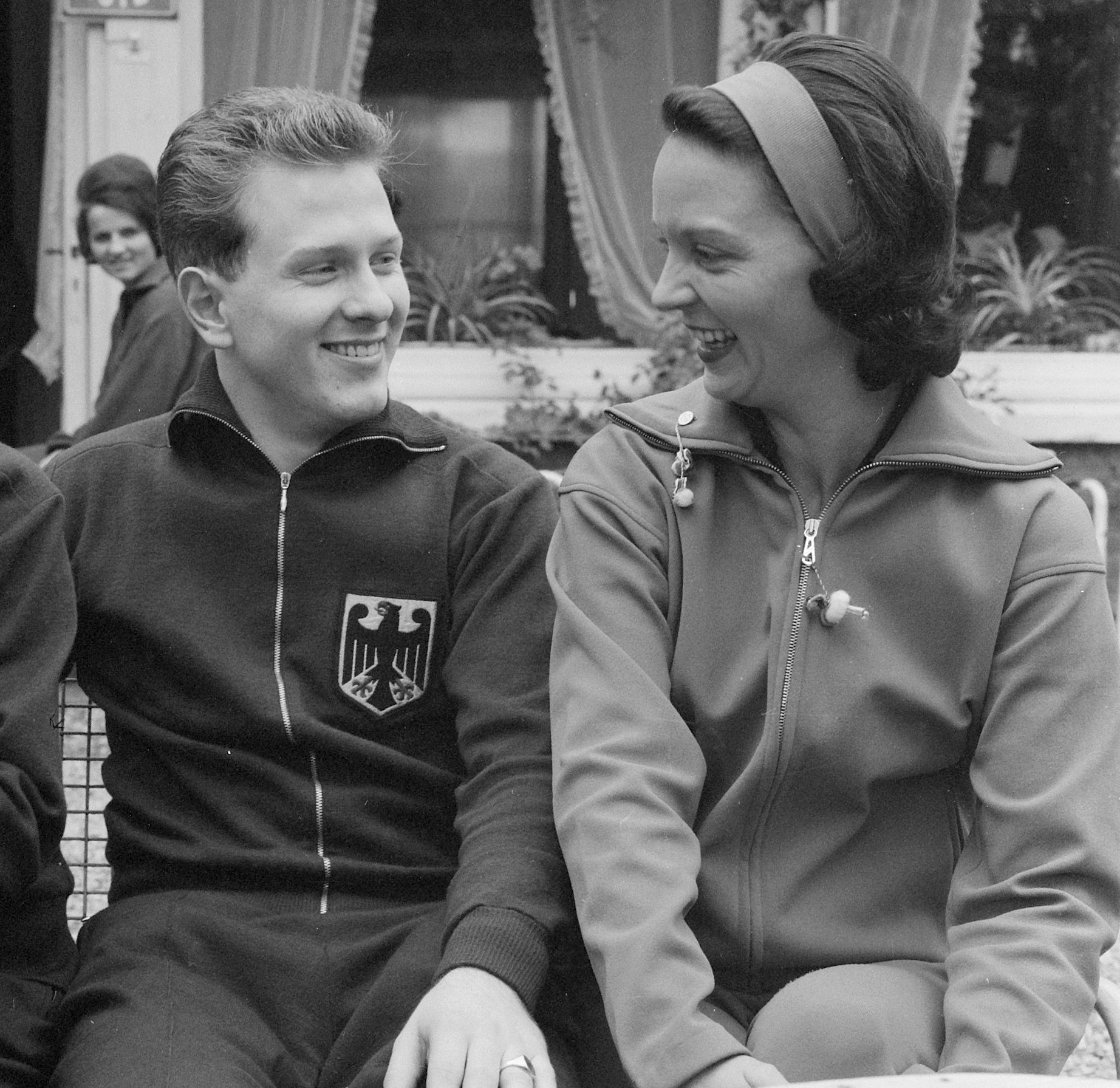 Internationale Tafeltenniskampioenschappen 1962, in Krelagehuis te Haarlem, v.l.n.r. Scholer (Dld) en Rowe (Eng)